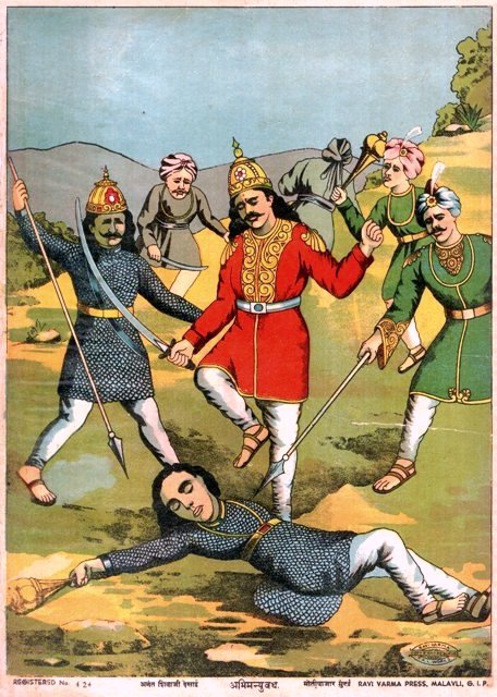 Abhimanyu Laxman Vadh